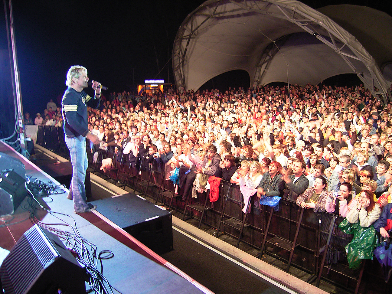 Matthias Reim beim Konzert im Familiengarten Eberswalde